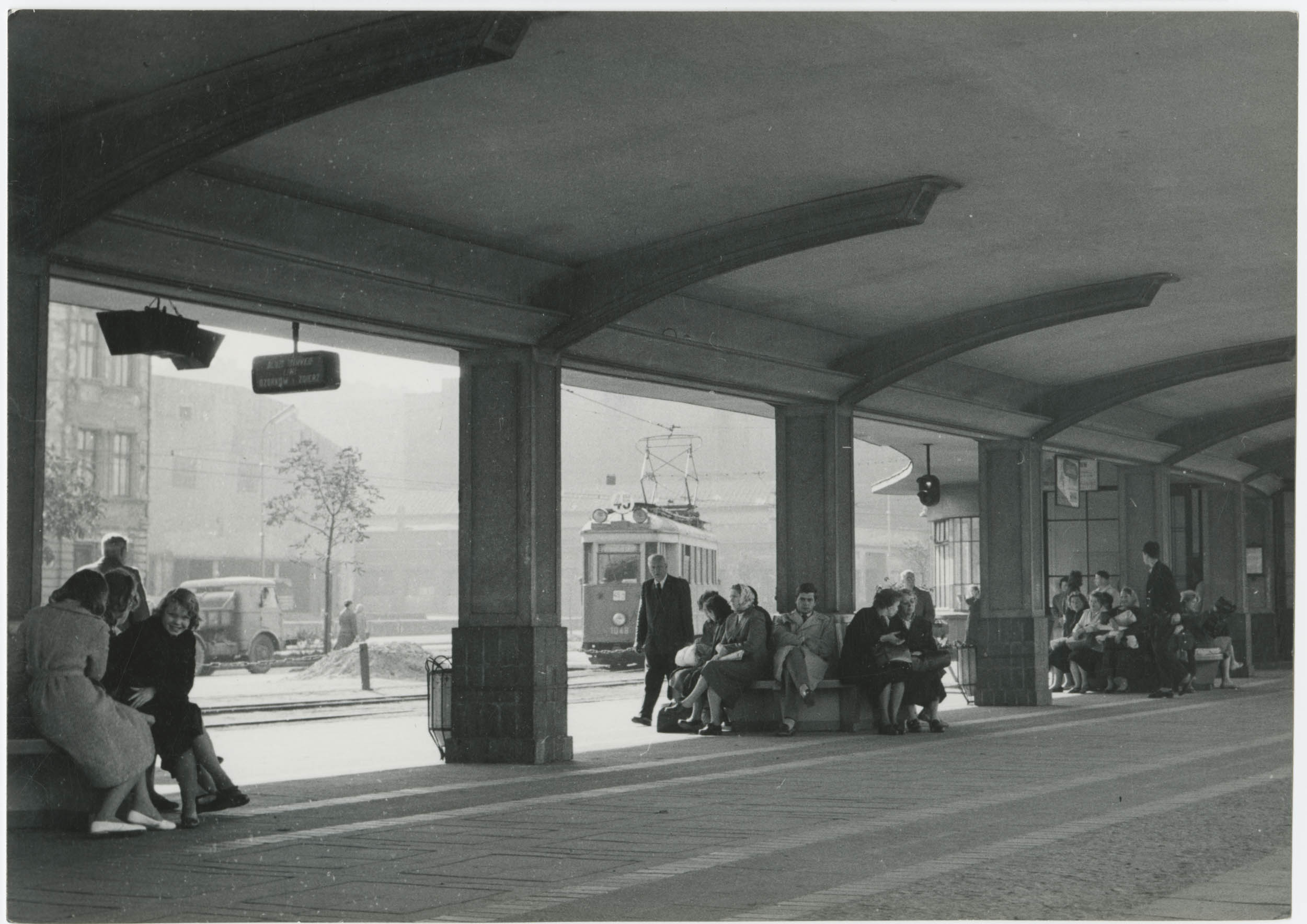 Fotografia Ignacego Płażewskiego przedstawiająca pętle tramwajową (nazywaną w Łodzi „krańcówką”) przy ulicy Północnej, na której znajdują się czekający pasażerowie. Krańcówka przy ulicy Północnej jest jedną z najbardziej znanych w Łodzi, dzięki swojej architekturze, typowej dla okresu, w którym została wybudowana. Wzniesiona została w 1951 r. W 1953 r. powstała poczekalnia dla pasażerów. Krańcówka była istotnym węzłem komunikacyjnym w Łodzi, to tu kończyły bądź zaczynały swoje trasy tramwaje linii podmiejskich, ponadto w latach 60. XX wieku kursowały do niej tramwaje linii miejskiej 26 i 26 bis. Pętla pełniła swoją rolę do 31 stycznia 2004 r., kiedy o godzinie 23.26 odjechał z niej ostatni rozkładowy tramwaj linii 45. Infrastruktura trakcyjna nie została jednak zlikwidowana, a pętla pełniła rolę pomocniczą w przypadku zatrzymań ruchu lub remontów. W 2012 r. na sesji Rady Miejskiej podjęto decyzję o przekazaniu budynków znajdujących się na terenie krańcówki Łódzkiej Okręgowej Izbie Architektów. Po generalnym remoncie mieści się tam siedziba Izby, Klub Architektów oraz przestrzenie wystawiennicze. Od 2 kwietnia 2017 – po reorganizacji linii komunikacyjnych MPK Łódź, wprowadzono w tym miejscu ponownie regularny ruch tramwajów podmiejskich.